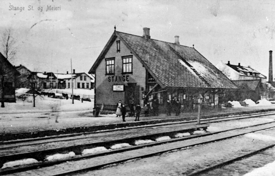 Stange stasjon, ca. 1910. Fotograf iflg. Digitalt museum: Larsen-Normann. Fra Domkirkeoddens fotoarkiv. Inventarnummer: 0417-08595.